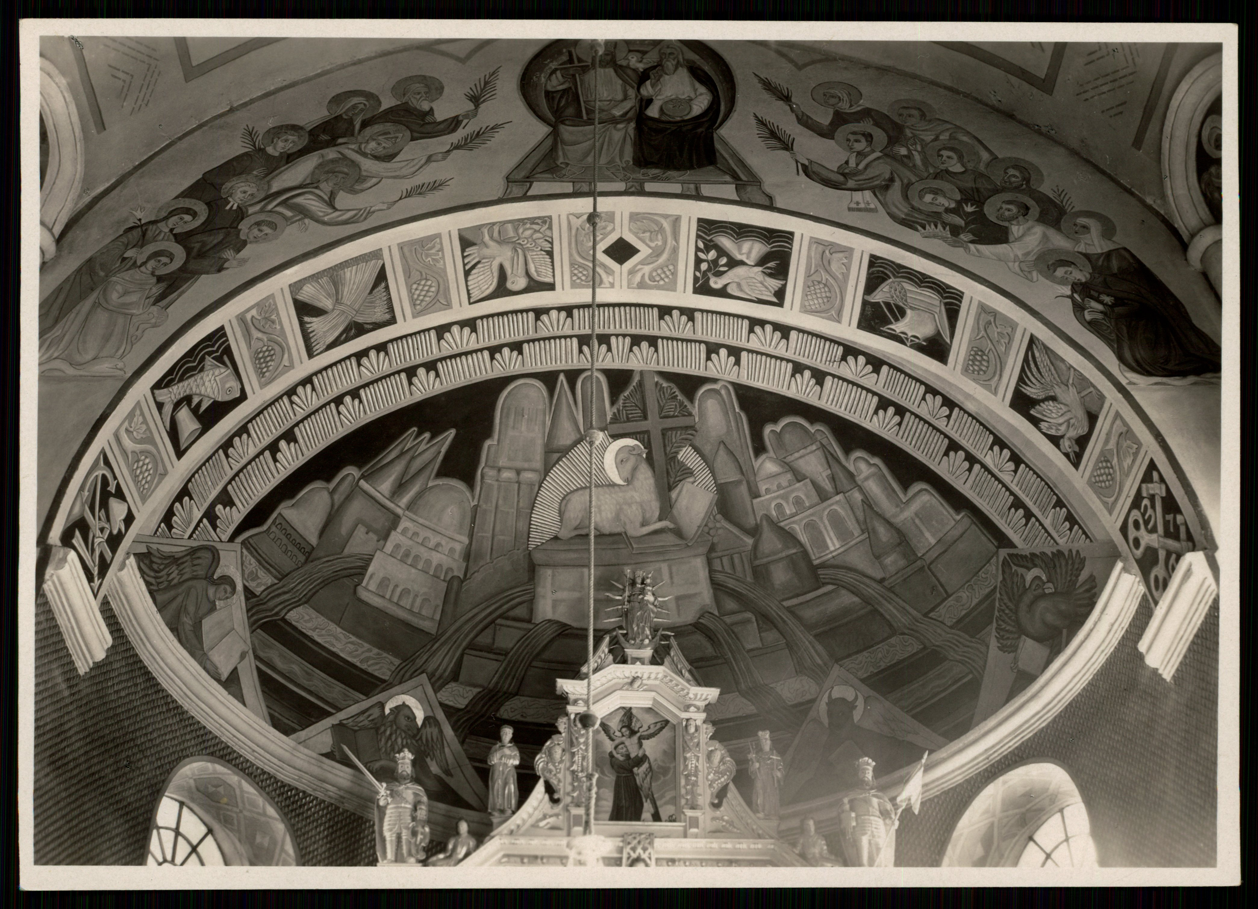 Polichromia autorstwa Zofii Baudouin de Courtenay, kościół w Chruślinie